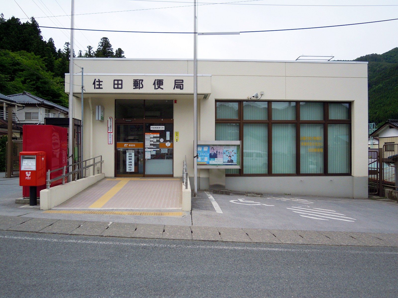 岩手県気仙郡住田町にある住田郵便局外観。